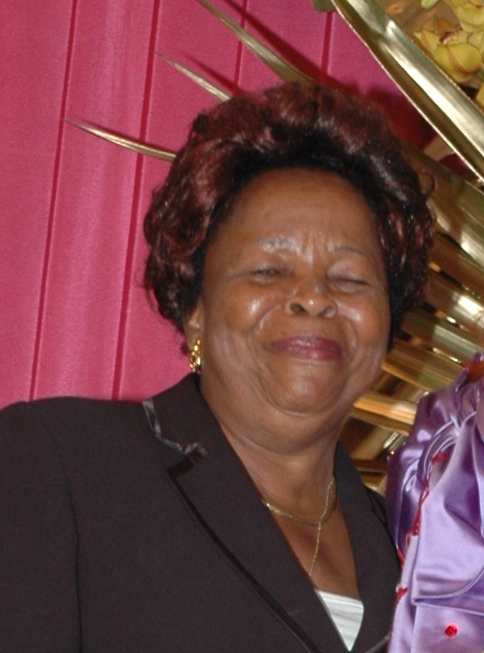 Mme Chantal Biya, première dame du cameroun recevant les voeux de Mme Genéviève Tjoues,Vice présidente du Sénat, en 2012